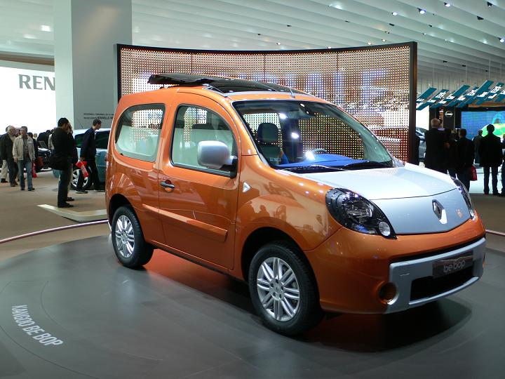 Renault Kangoo Bebop